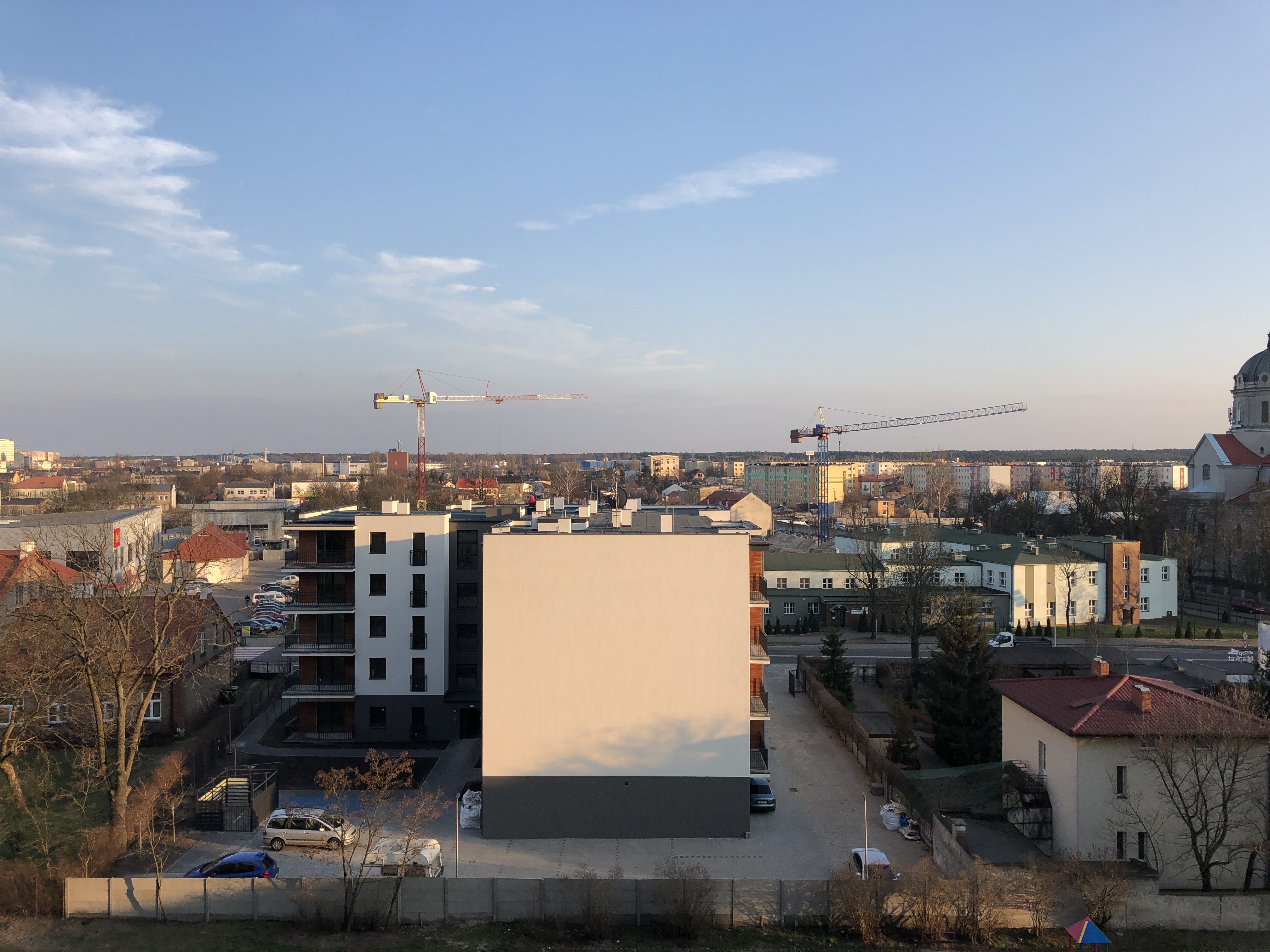 Nowy blok przy ul. Wiejskiej oraz dwa żurawie na placu budowy sądu przy ul. Żeromskiego (2020)